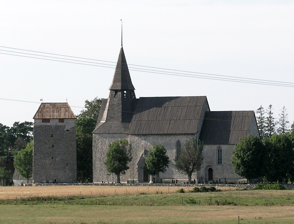 Gammelgarns kyrka, Diocese of Visby, Gotland, Sweden.